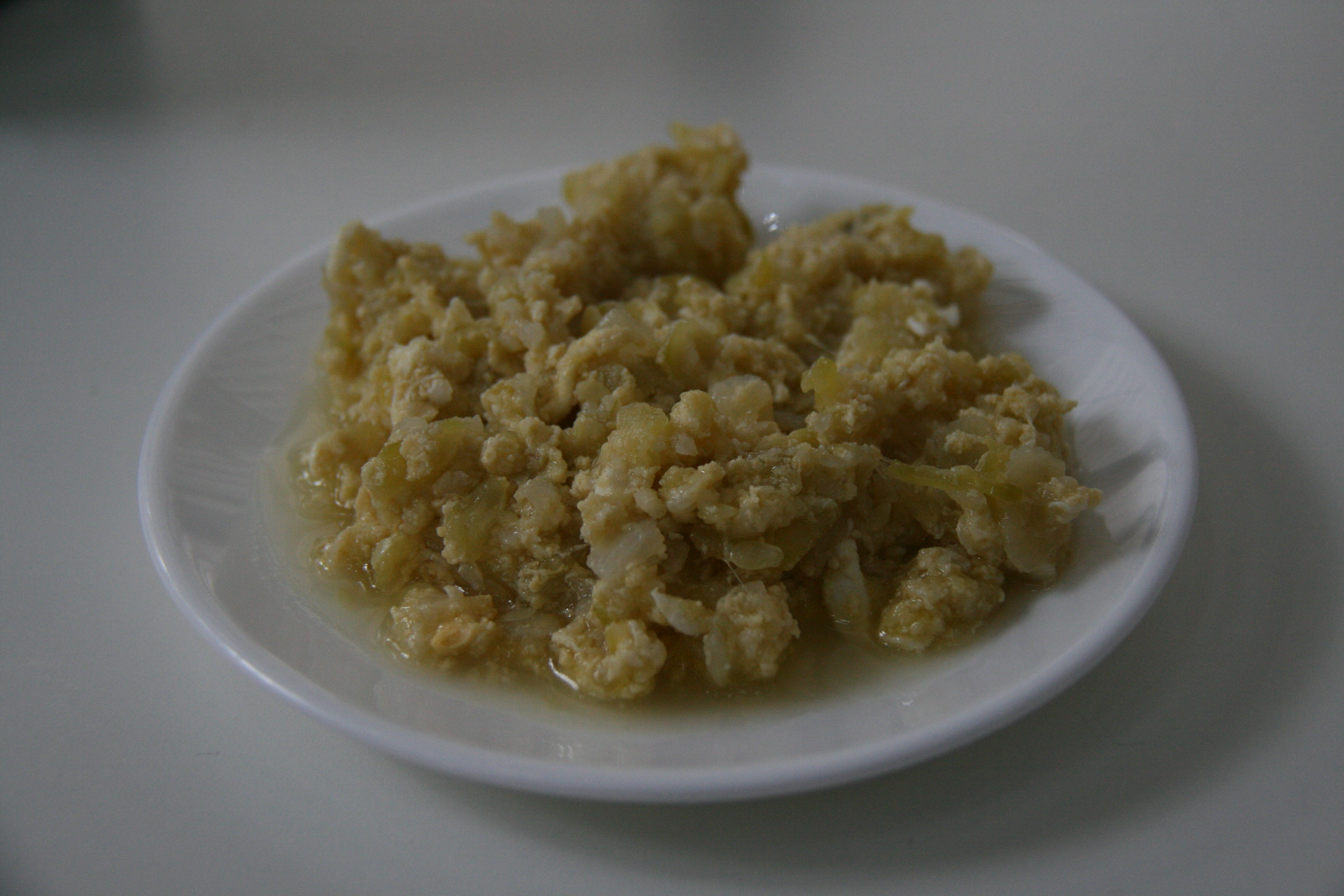 Zarangollo murciano